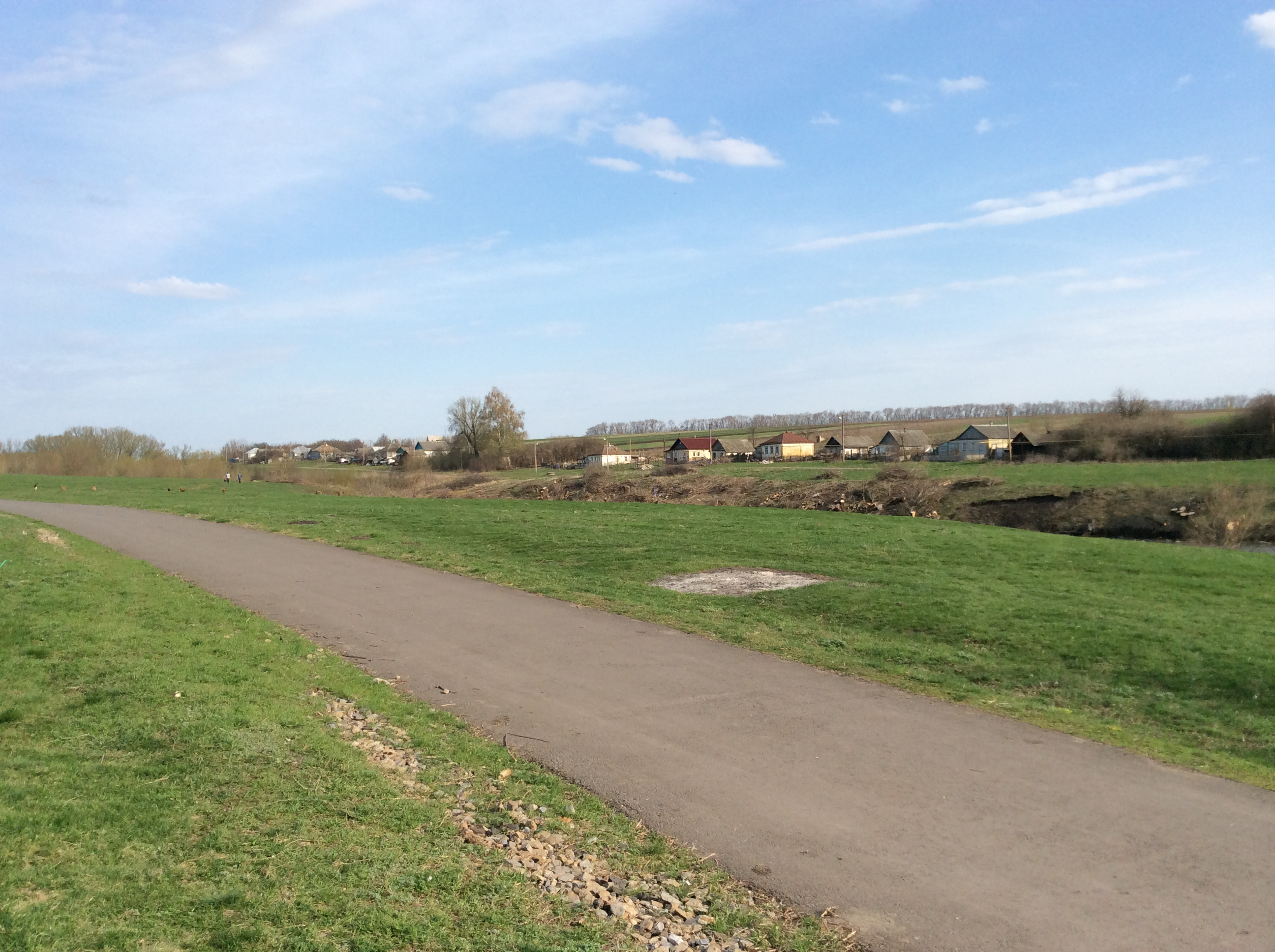 Лазурное улица Дружбы нечетная сторона